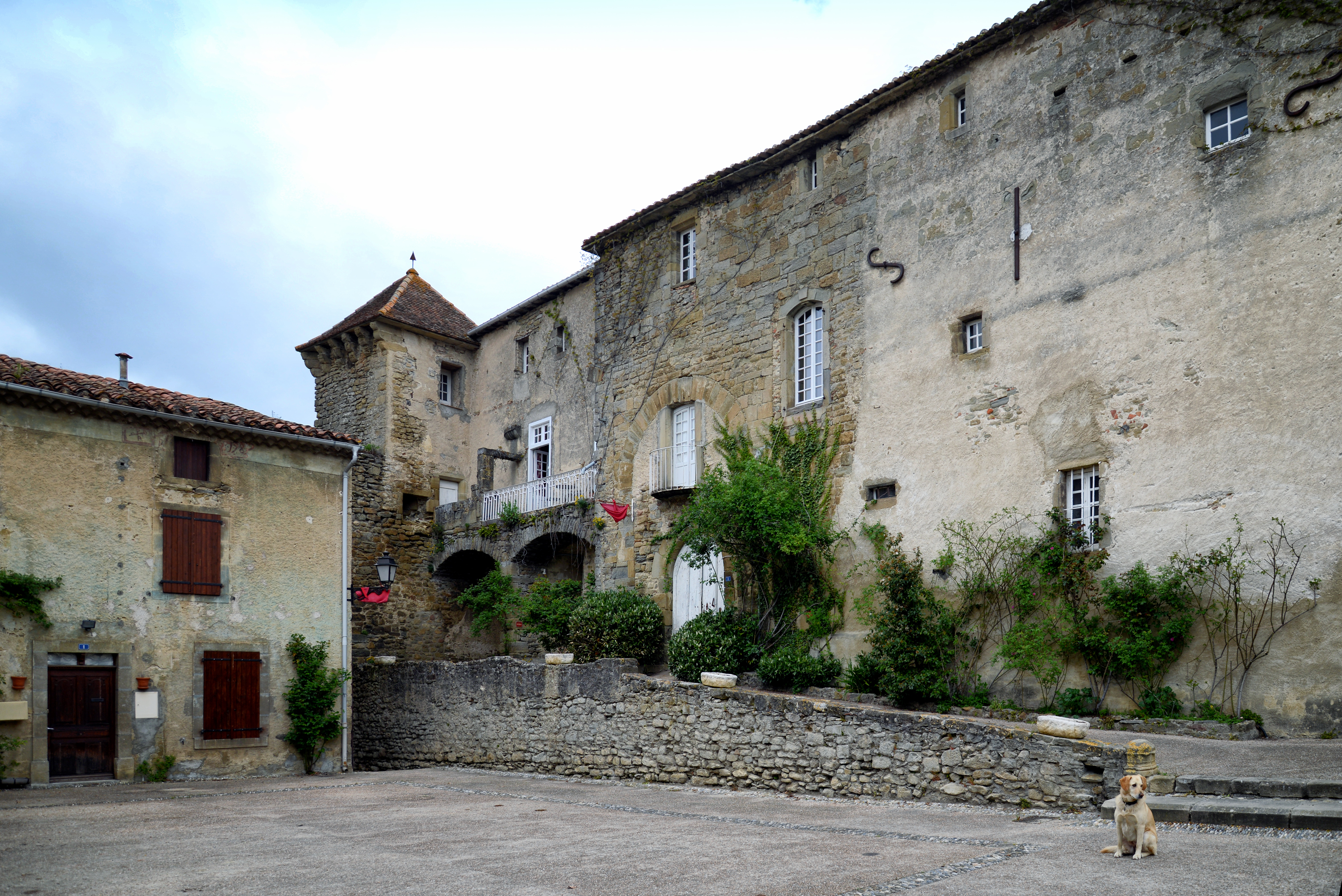 Camon, Ariège (Midi-Pyrénées) - L'ancienne abbaye